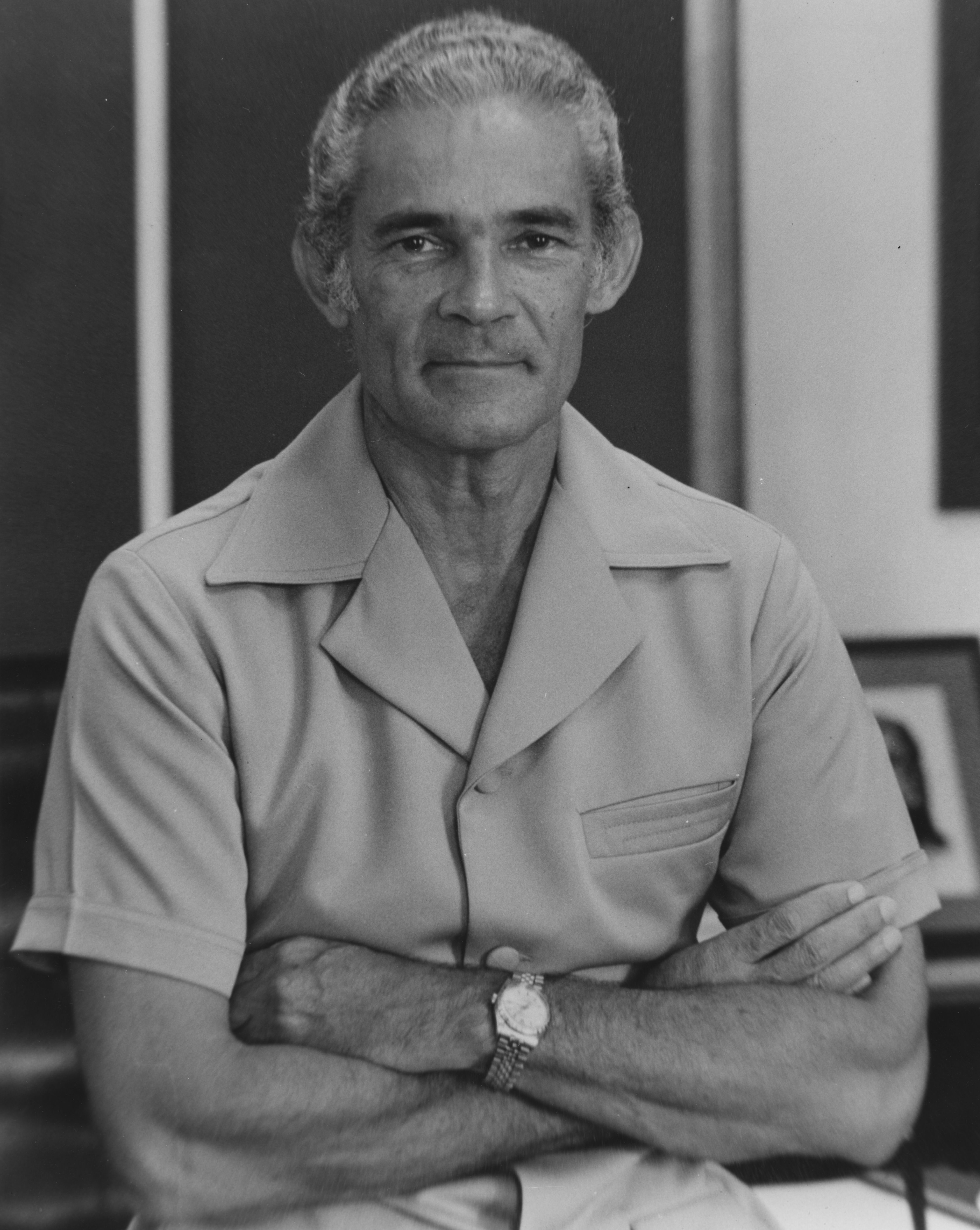 IMAGELIBRARY/576 Persistent URL